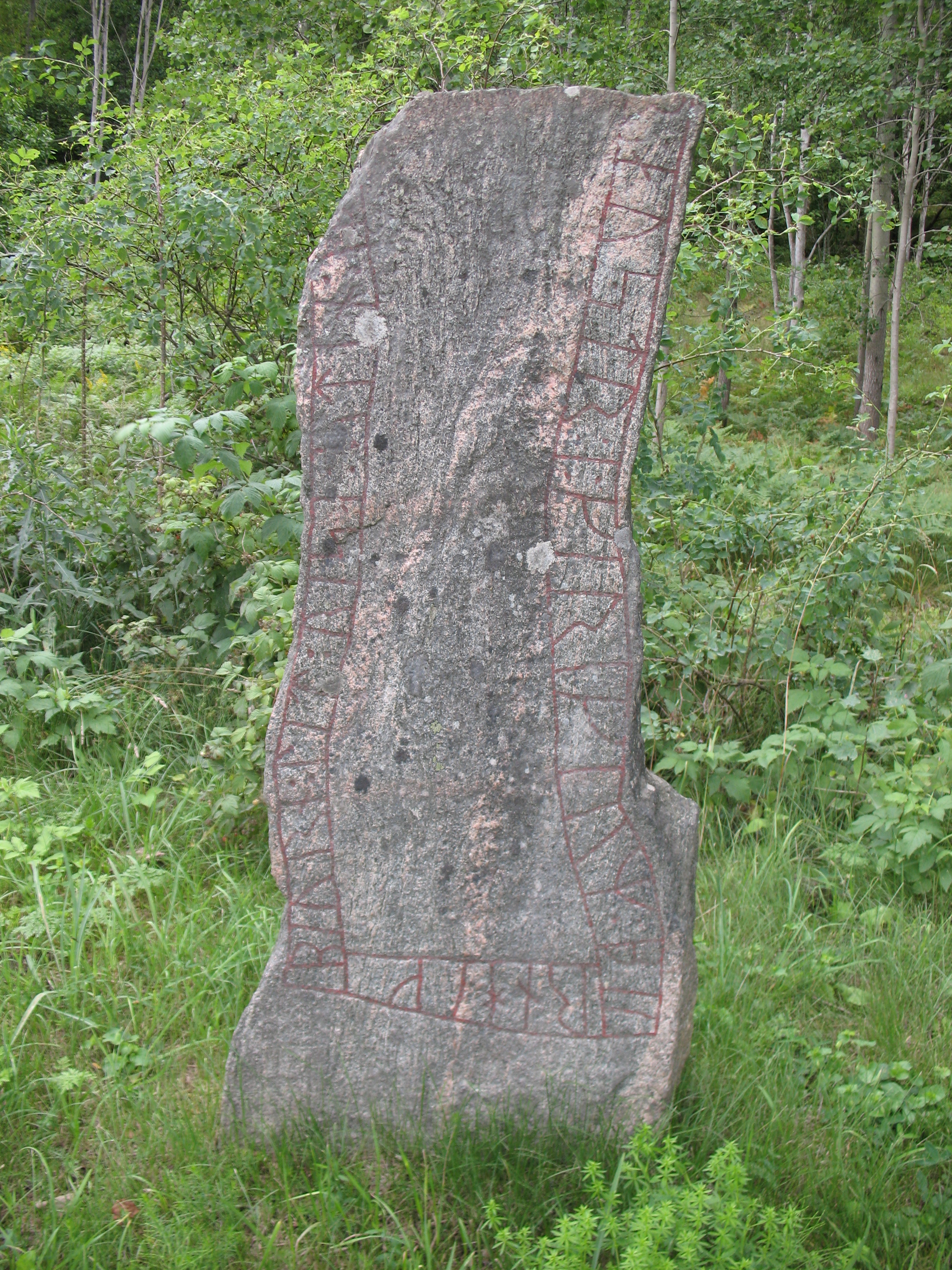 Runestone Sö Fv1954;20 near Nolinge, in Svartlösa parish, south of Stockholm, Sweden.